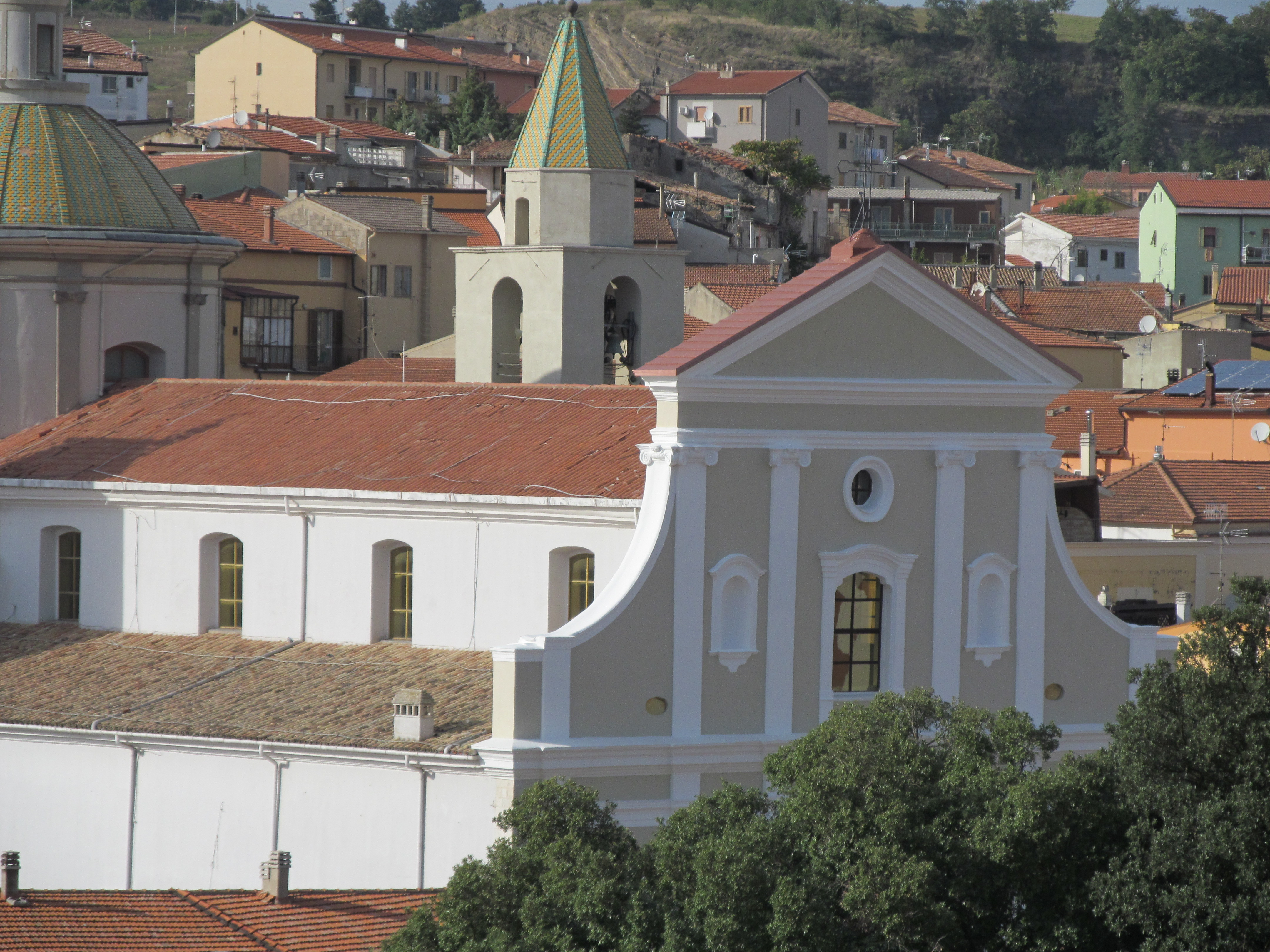 chiesa di San Marco Evangelista This is a photo of a monument which is part of cultural heritage of Italy.